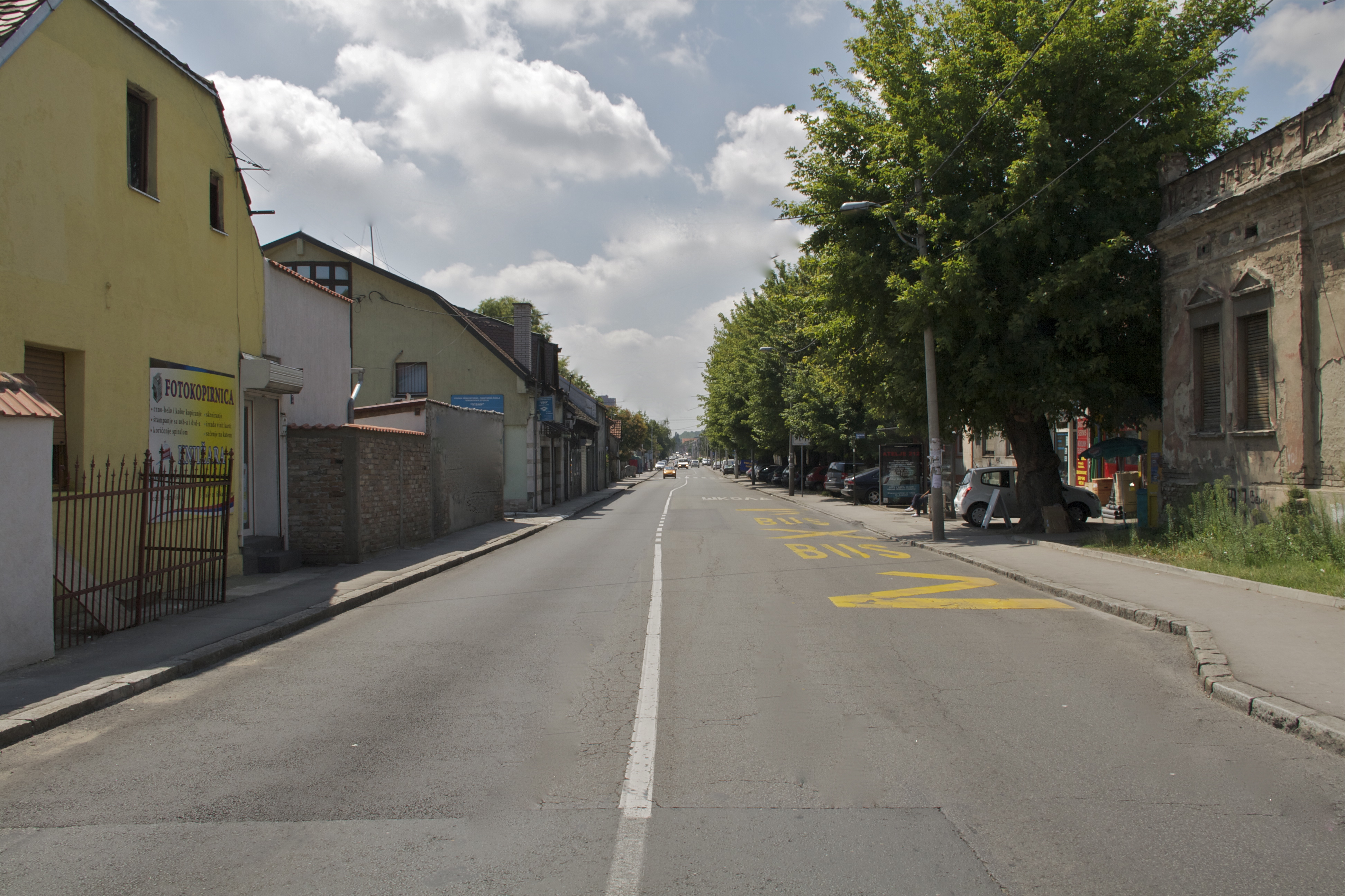 Тошин бунар, Земун